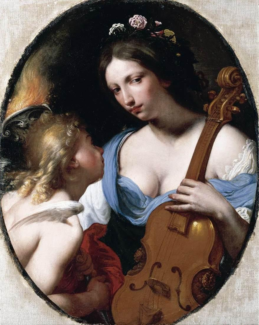 (St Cecilia)